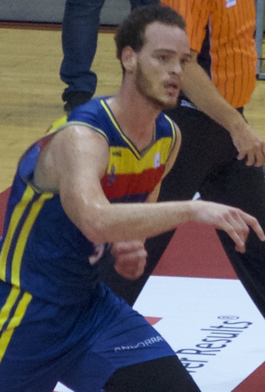 Reggie Upshaw Jr, jugador del Morabanc Andorra, en el partit de semifinals de la Lliga catalana 2018-19 davant el Divina Seguros Joventut.